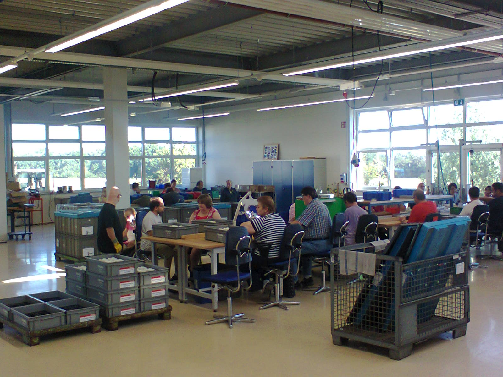 Es handelt sich hier um eine der Produktionshallen in der Betriebsstätte in Ülpenich. Die Aufnahme stammt aus dem Jahr 2013 und zeigt Beschäftigte bei der Arbeit.